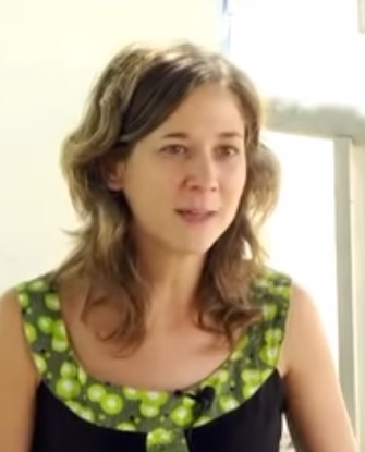 Marina Albiol 2014